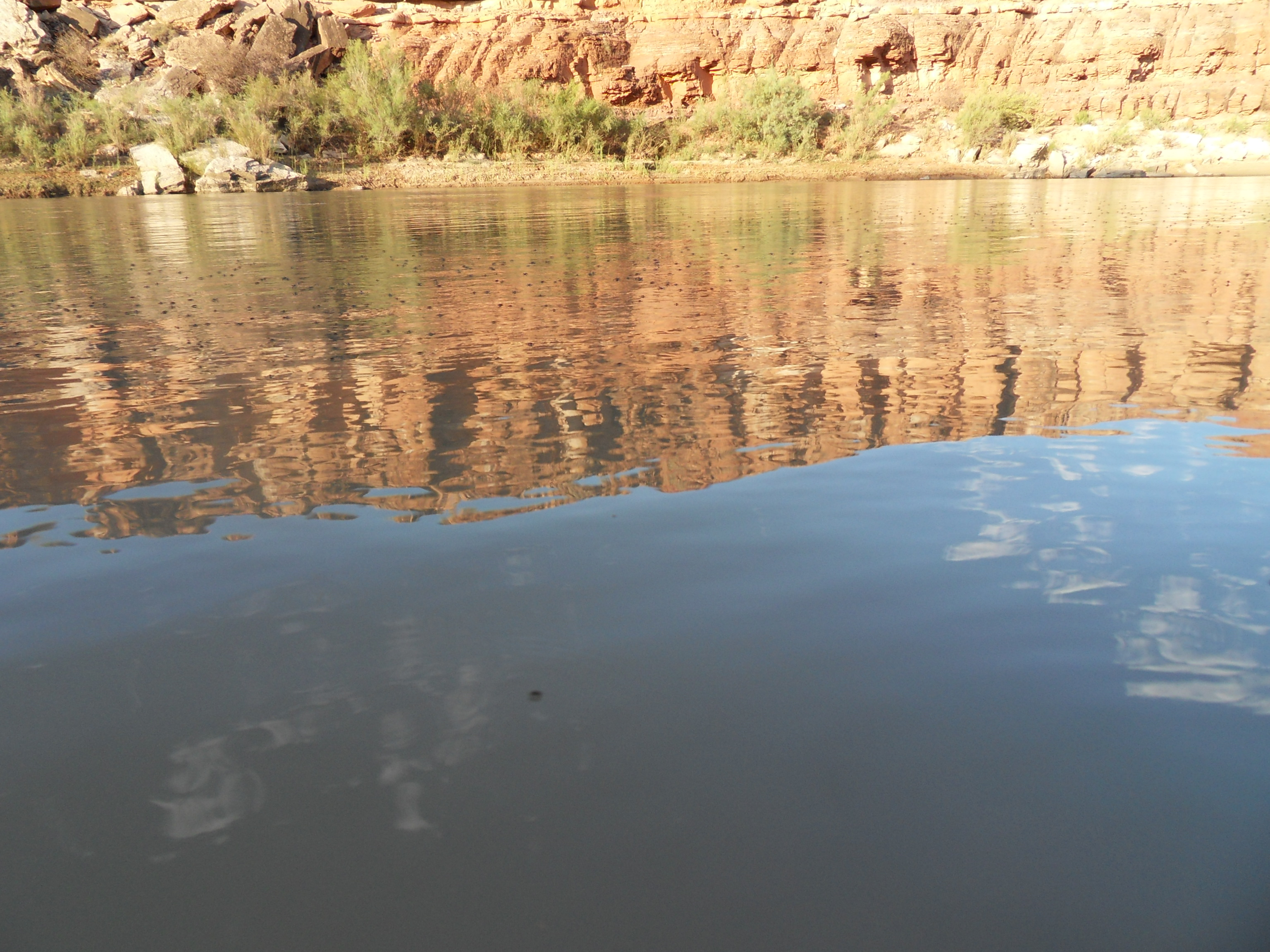 Waterspiegeling vlakbij Mexican Hat.